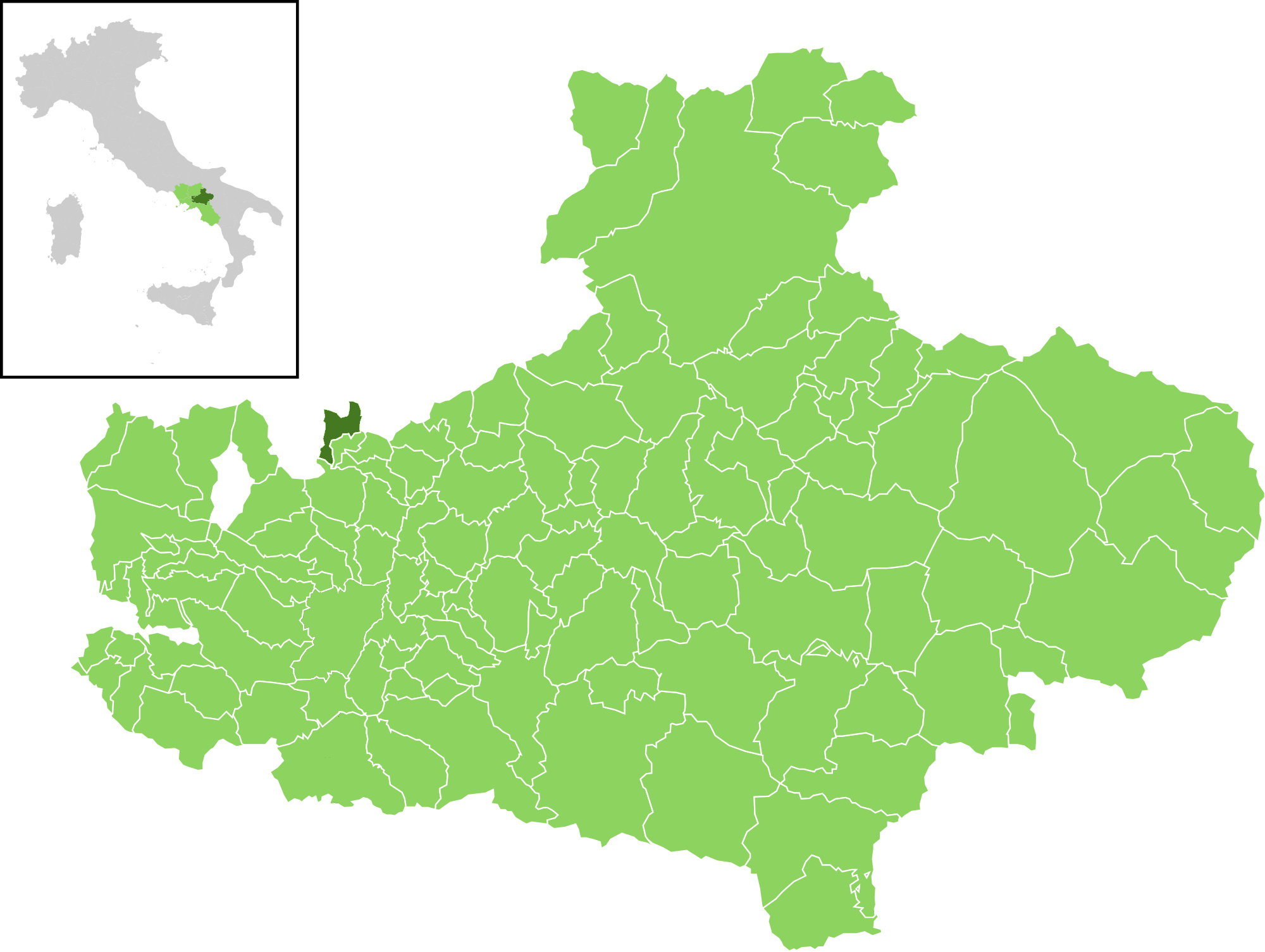 Il comune all'interno della provincia di Avellino